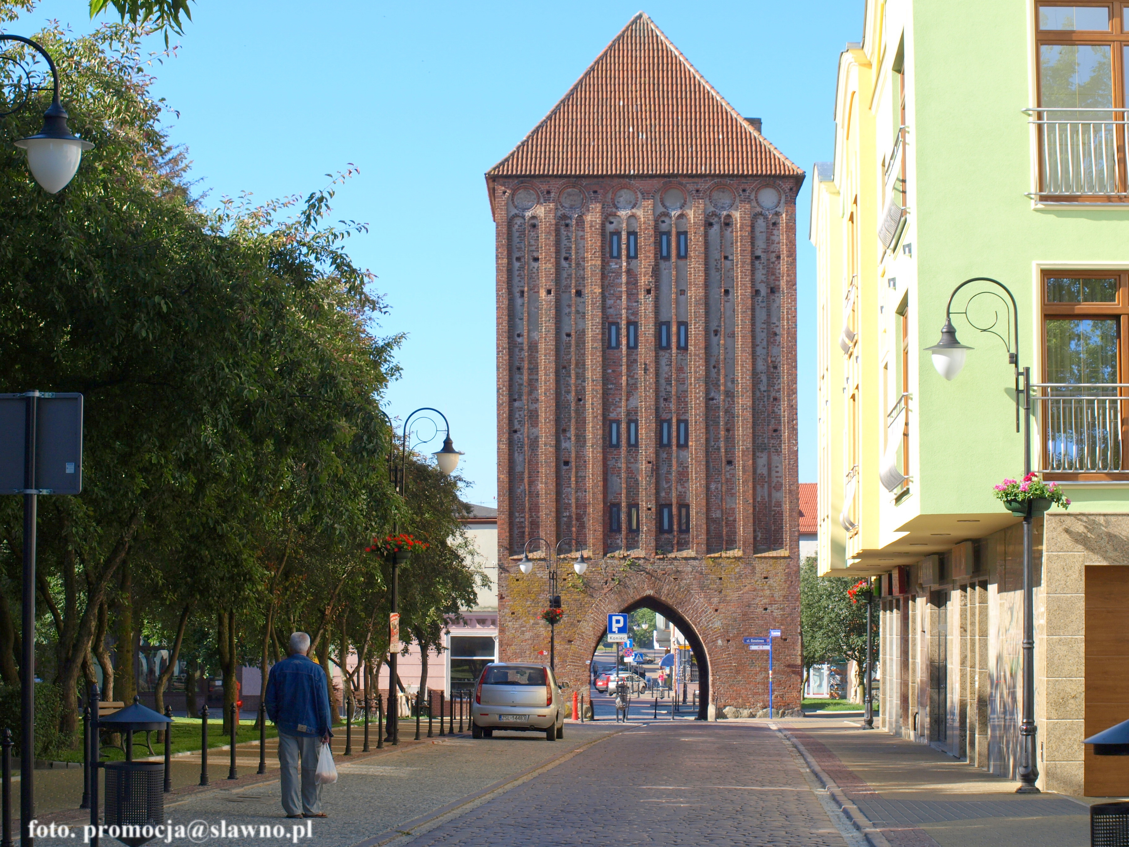 Brama Koszalińska w Sławnie znajduje się przy ul. Jedności Narodowej